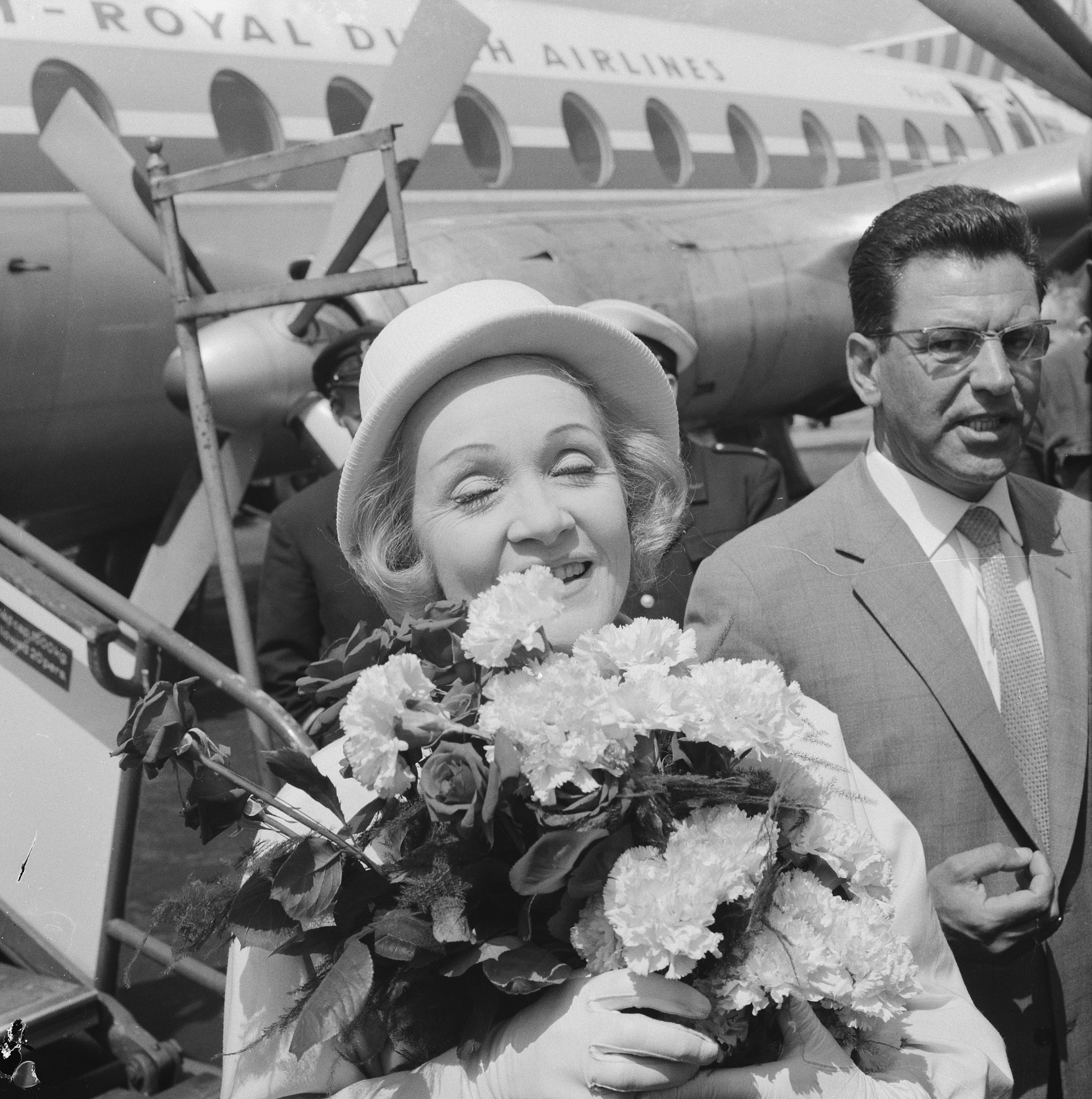 Marlene Dietrich am Flughafen Schiphol vor einem Auftritt im Kurhaus Scheveningen.